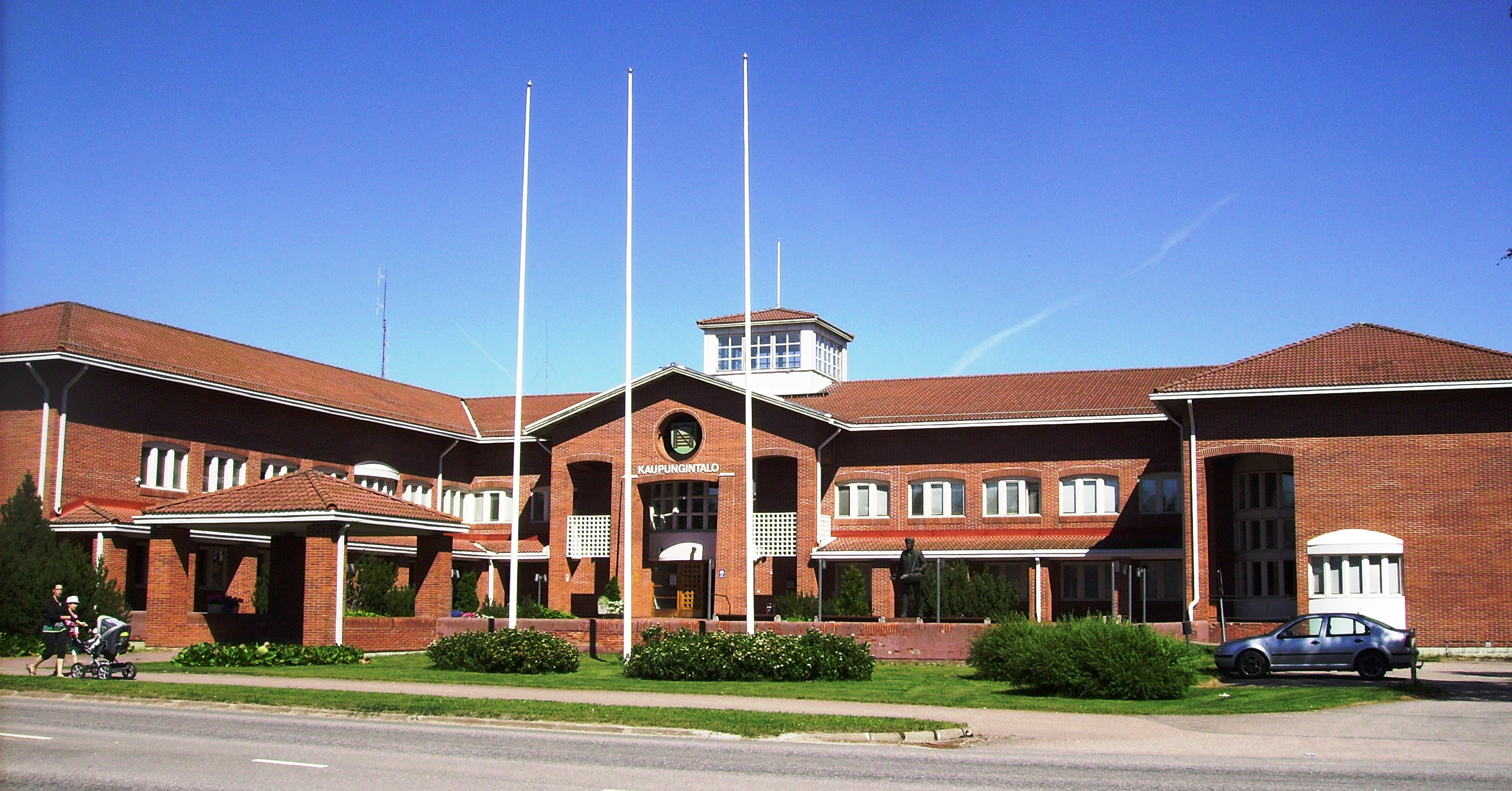 Nivalan kaupungintalo.